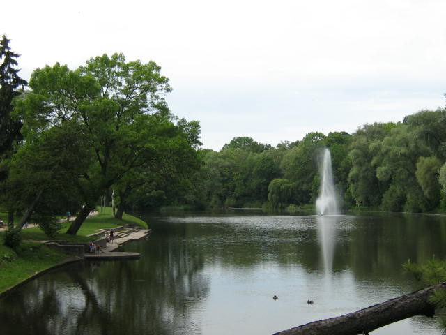 Jezioro Rusałka w Szczecinie